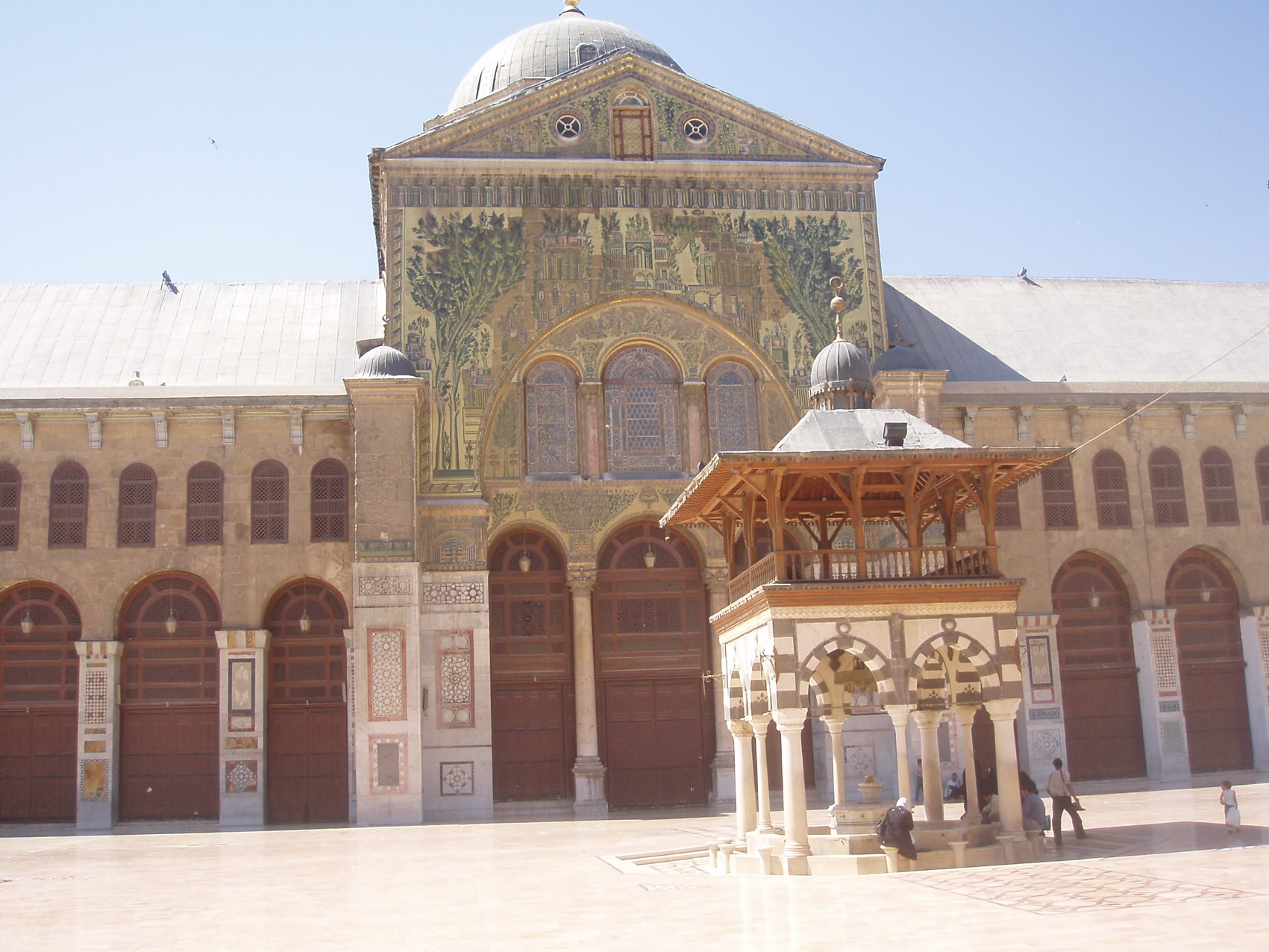 Le sahn et la salle des prière en arrière-plan